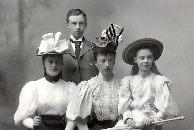 Großherzogin Anastasia zu Mecklenburg und Kinder um 1895